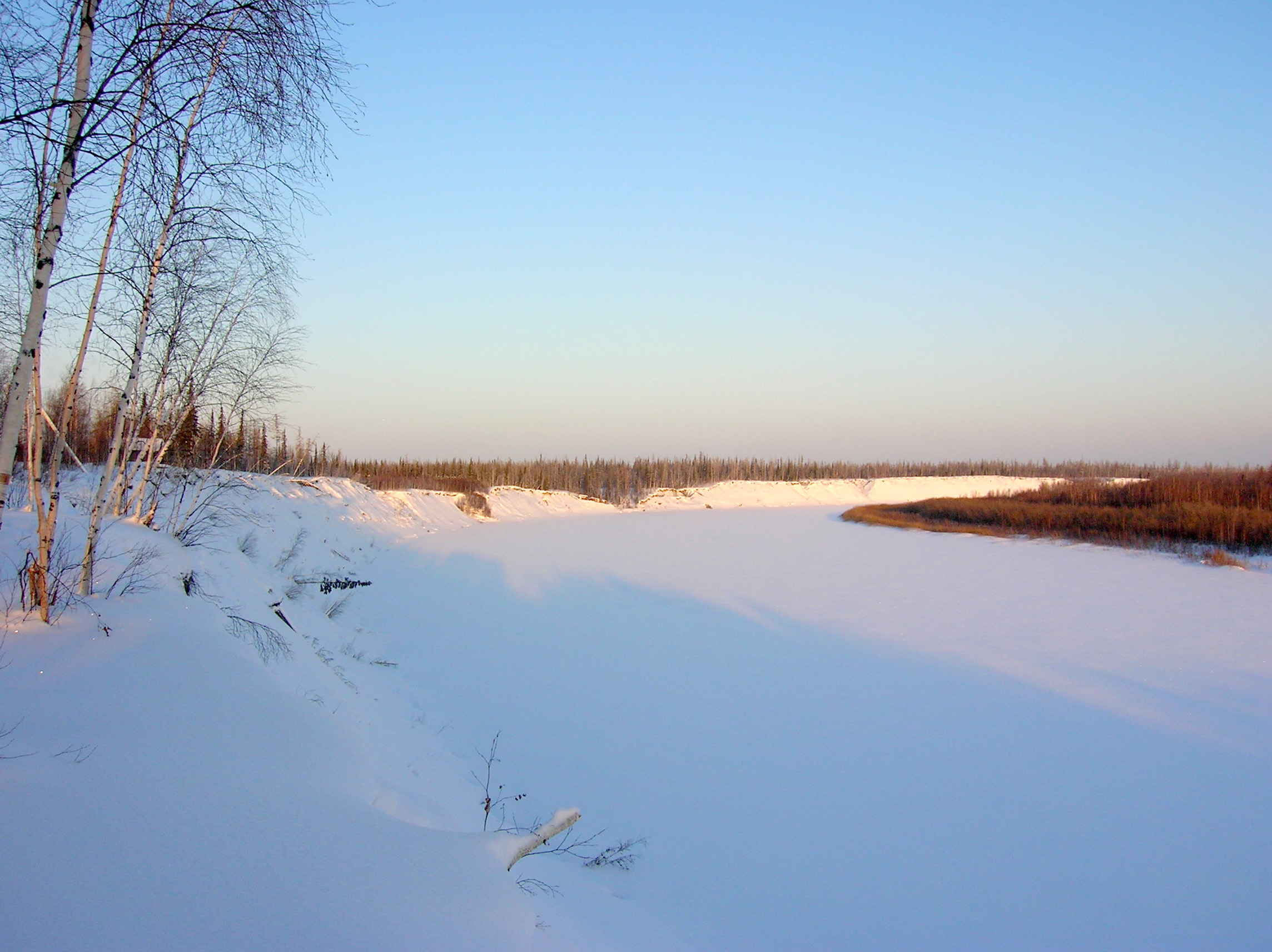 р. Правая Хетта с правого берега